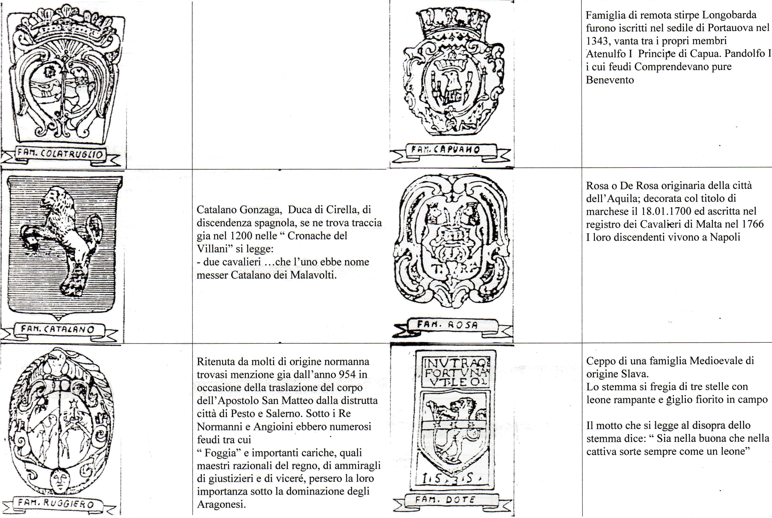 Stemmi di alcune famiglie nobiliari di San Bartolomeo in Galdo